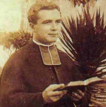 Henri Boudet (1837-1915), curé de Rennes-les-Bains, auteur de La Vraie Langue Celtique et le Cromlech de Rennes-les-Bains